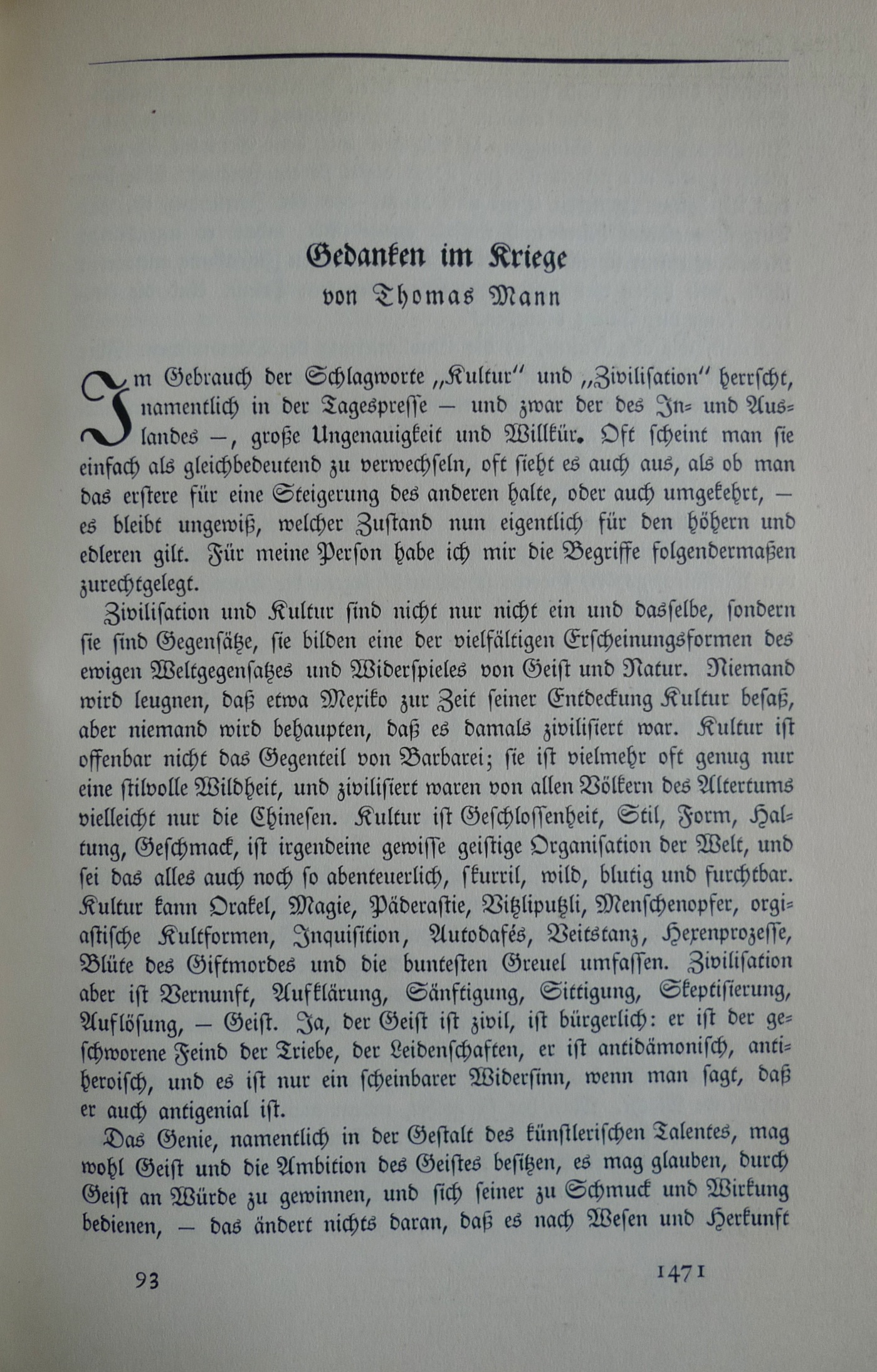 Gedanken im Kriege, Essay von Thomas Mann, erschienen in der Neuen Rundschau, 1914.